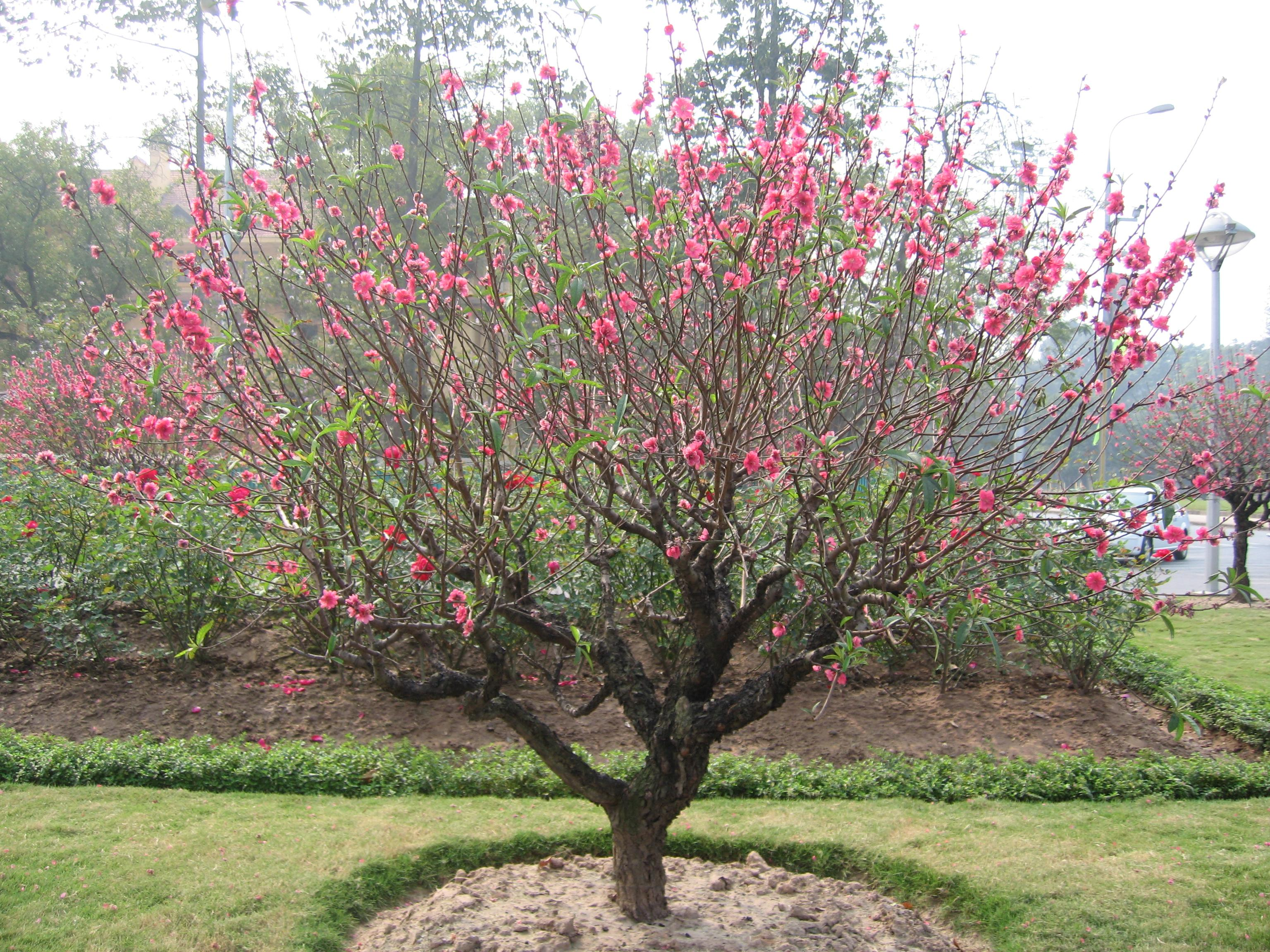 Cây đào. Ảnh này do người truyền lên chụp.